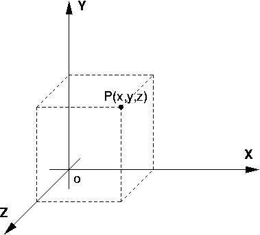 Sistema di riferimento tridimensionale ortogonale